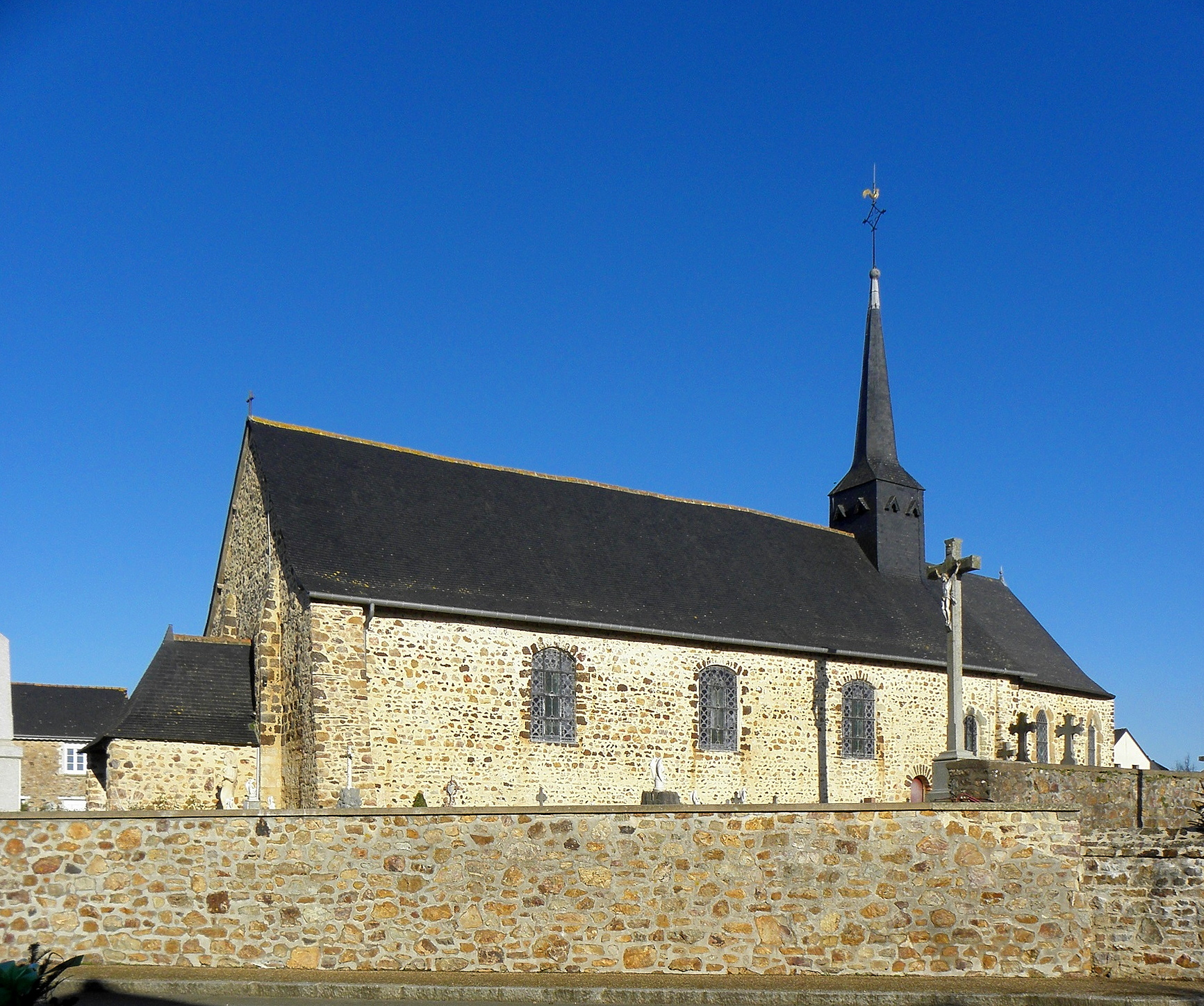 Église Notre-Dame-de-l'Assomption de Bréal-sous-Vitré (35). Vue méridionale.